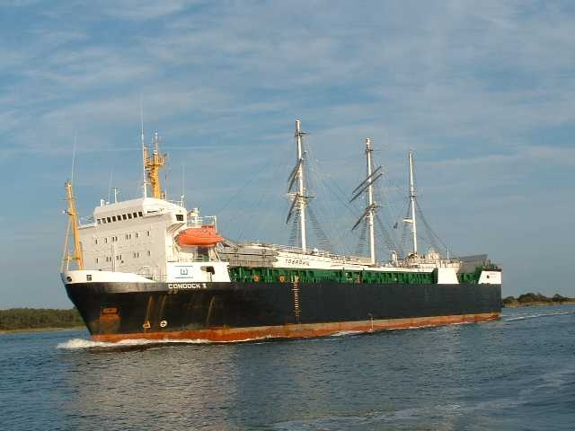 Comdock V mit der Towarischtsch vor Stralsund